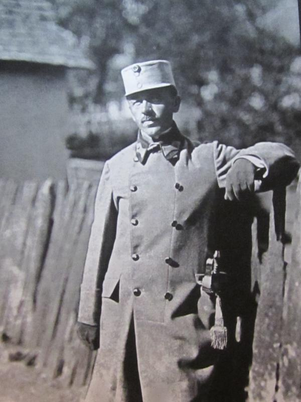 Михайло Гнатюк